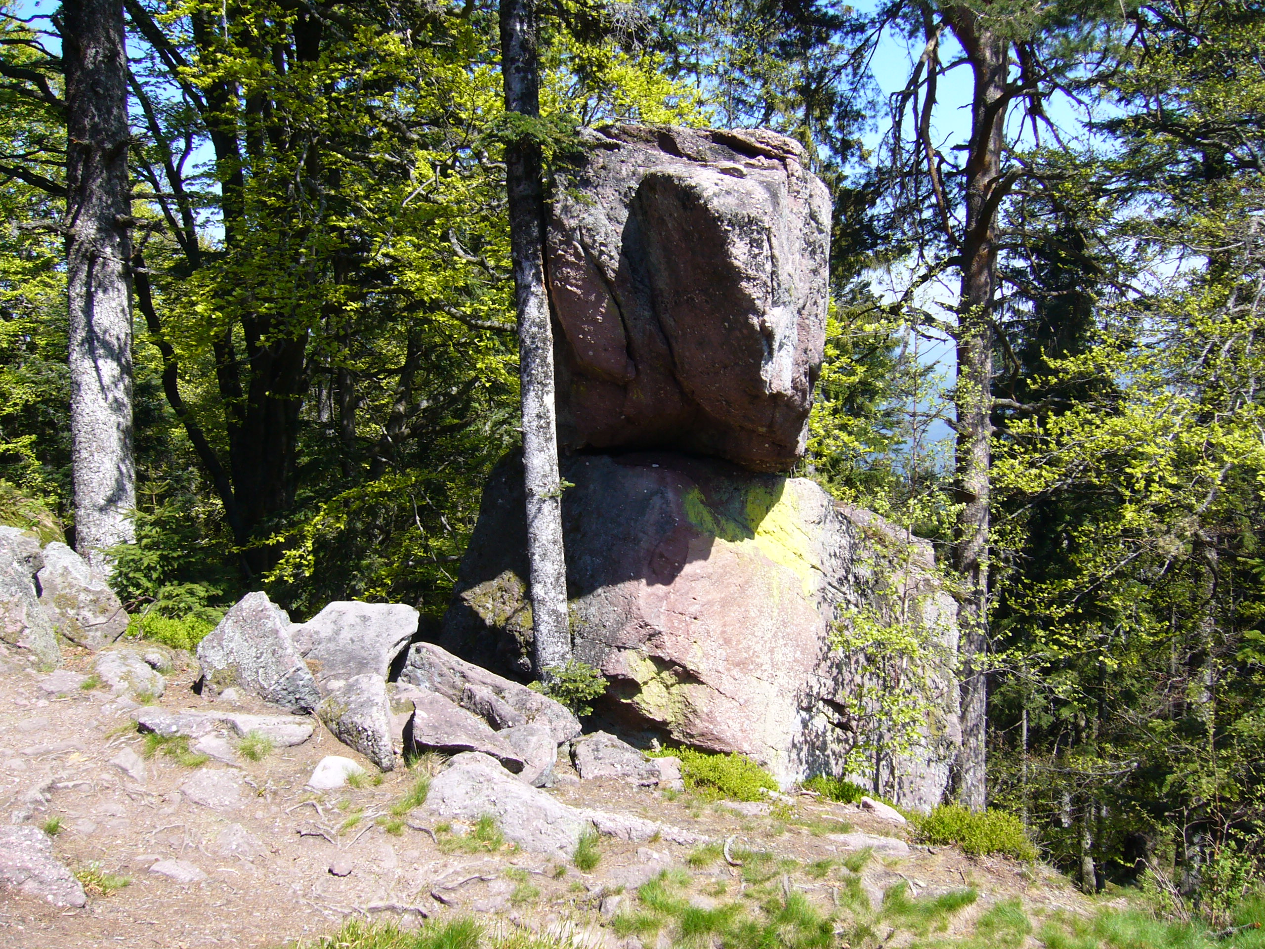 Taennchel 460.JPG